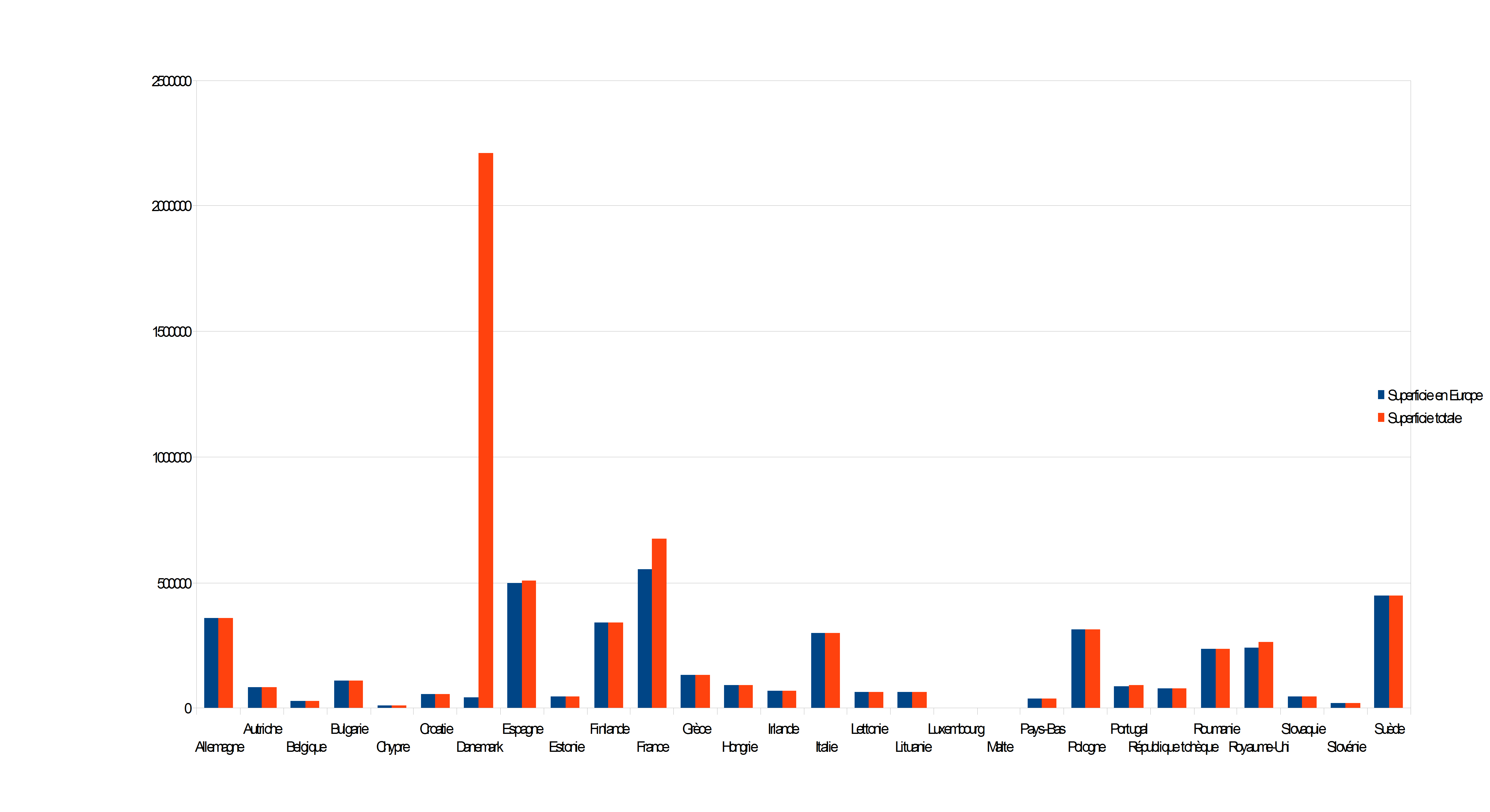 Diagramme représentant la superficie des pays membres de l'Union européenne, nous pouvons voir que les trois plus grands pays sont : le Danemark (2 210 573 km²), suivit par la France (672 369 km²) et enfin l'Espagne (505 911 km²).